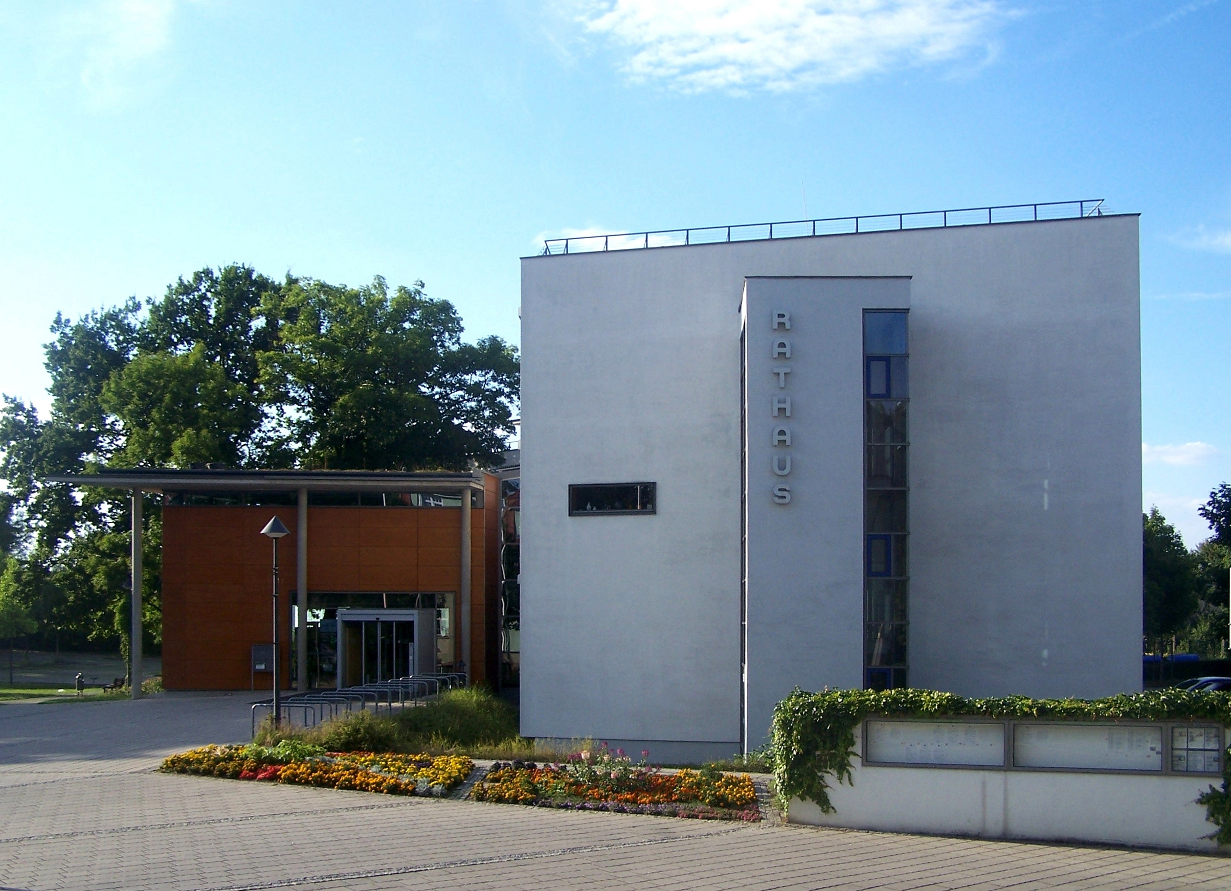 Rathaus Coswig, Landkreis Meißen, Sachsen